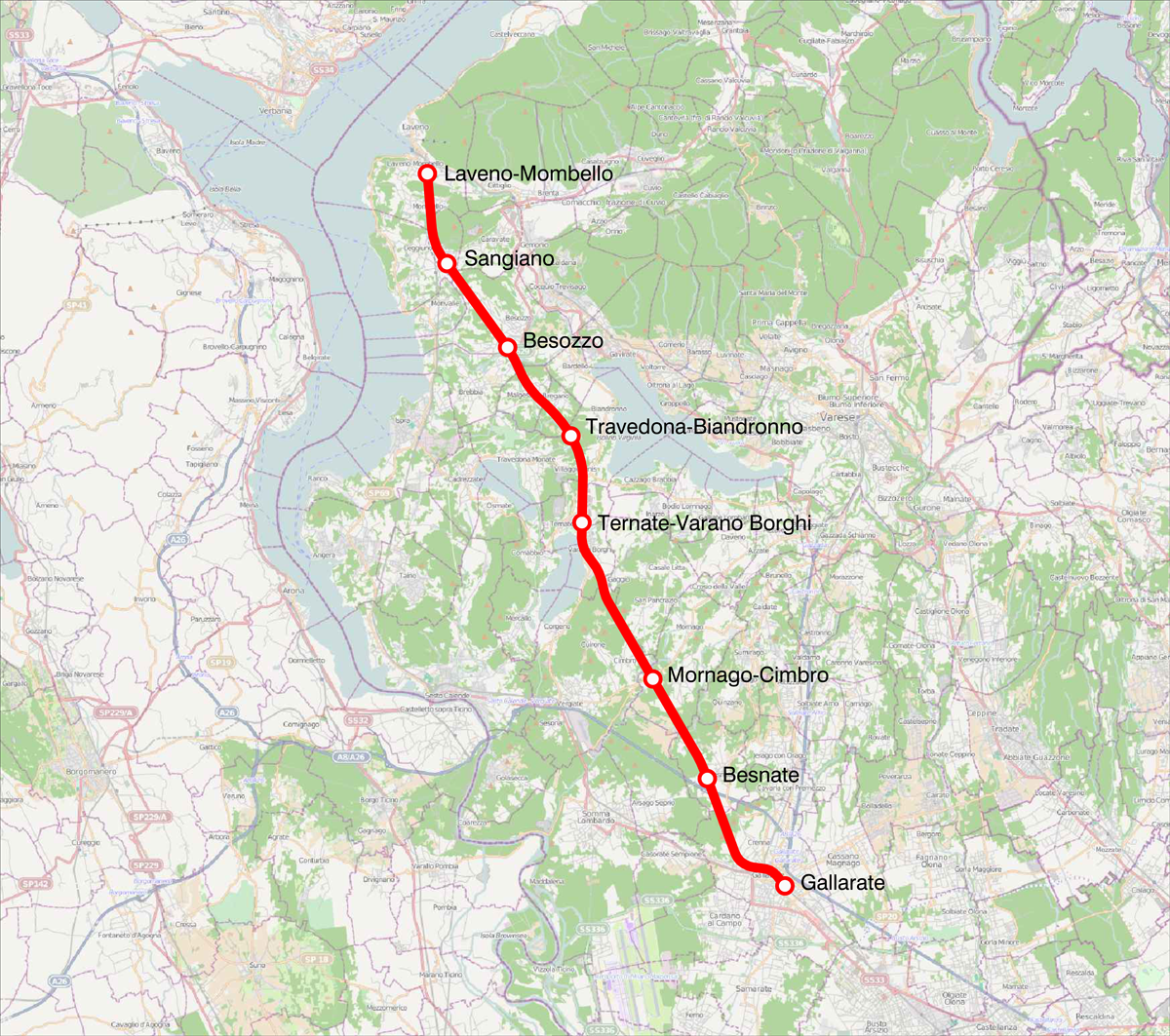 Mappa della ferrovia Gallarate-Laveno